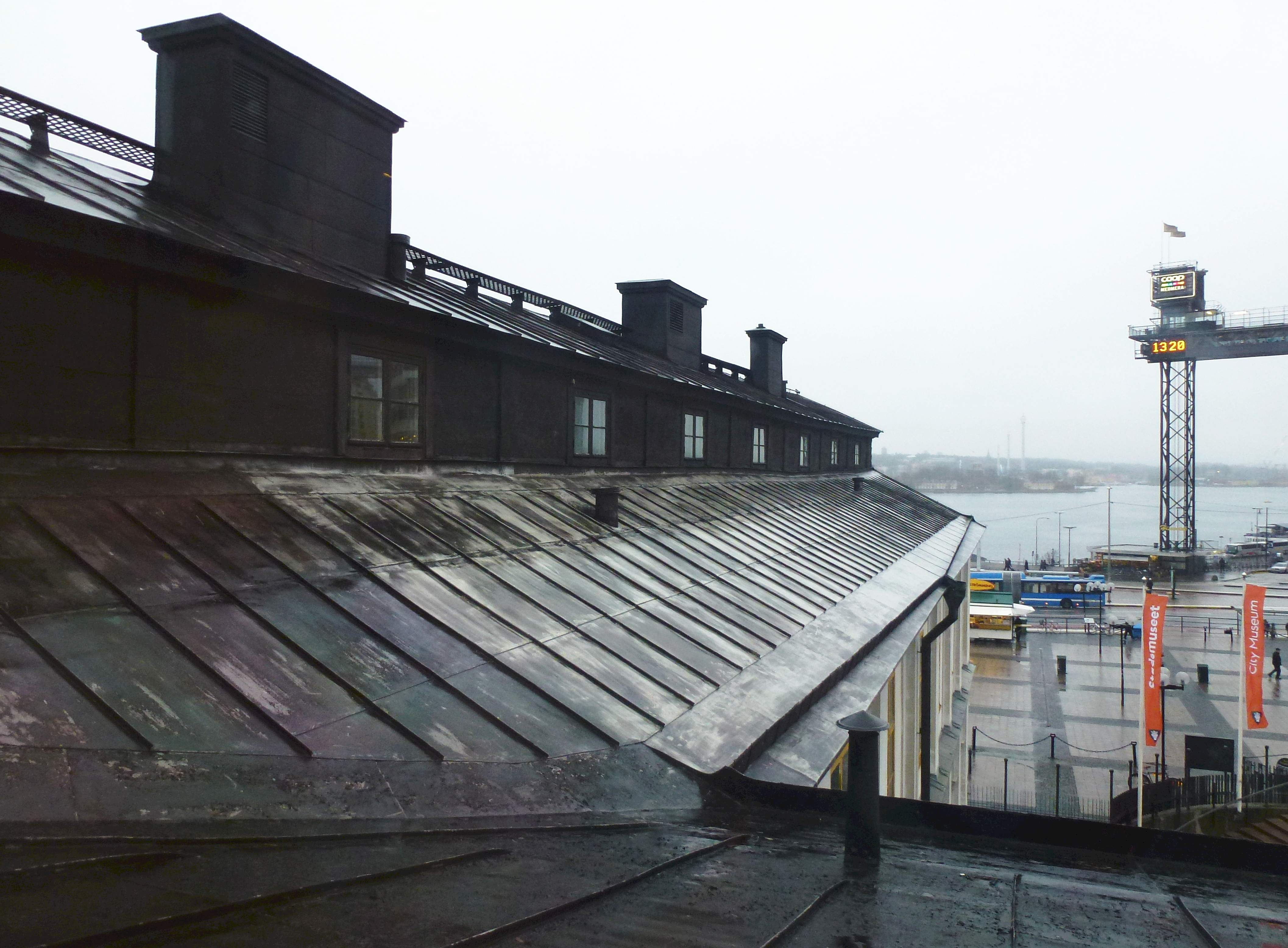 Södra stadshusets tak, norra flygeln